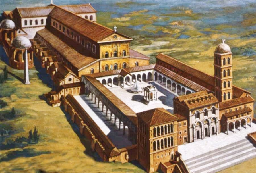 Reconstitution de l'ancienne basilique vaticane saint-Pierre de Rome (l’obélisque se trouve à gauche)